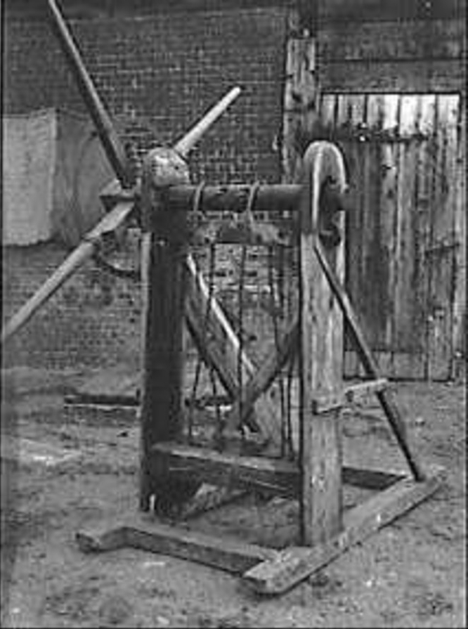 Kleigebied van IJssel en Oude Rijn/ Hooiberg: "buiten win" (opmerking: Deze afbeelding hebben wij helaas alleen in deze lage resolutie.)